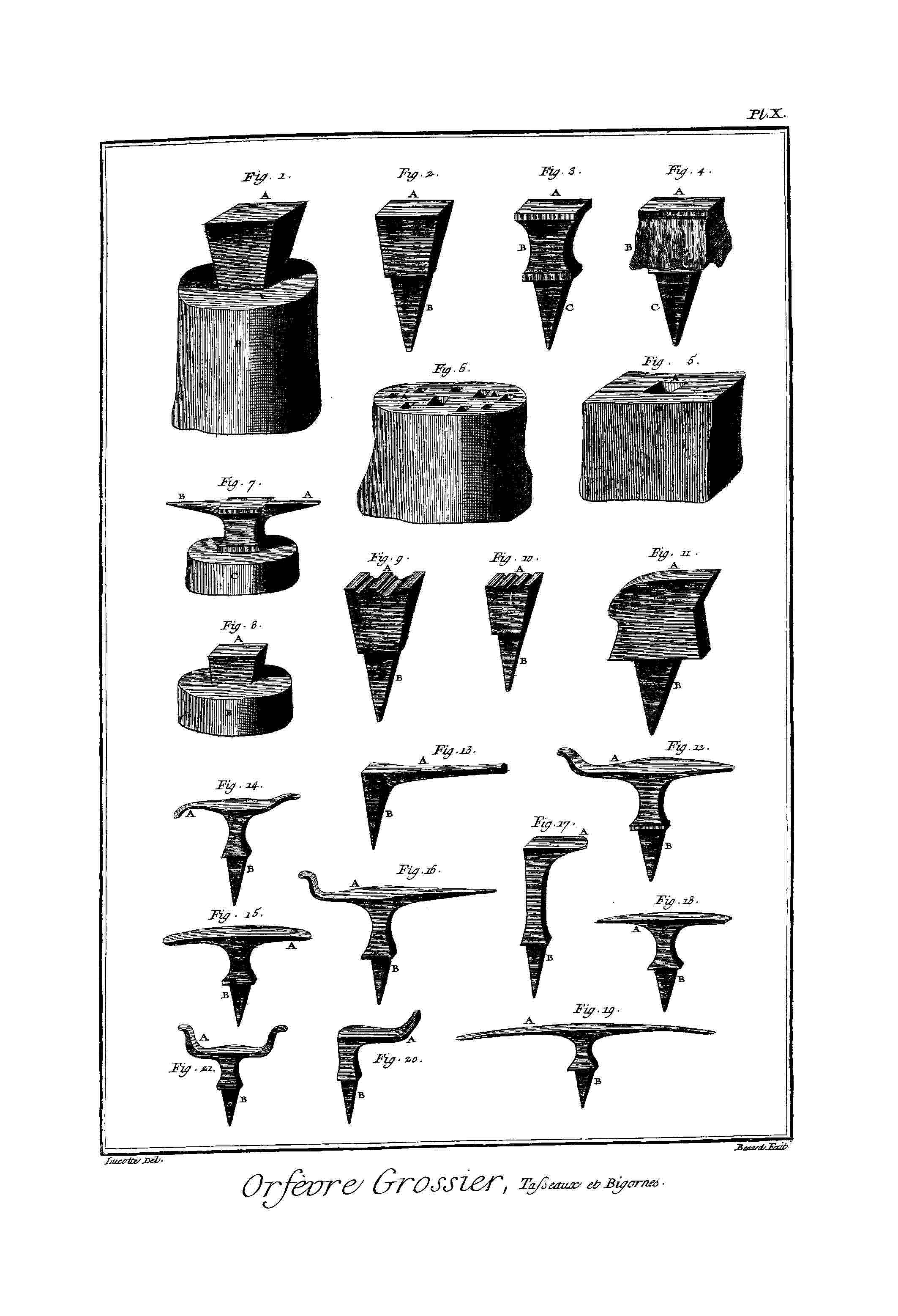 orfèvre 10: orfèvre grossier, tasseaux et bigornes